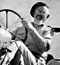 Brigadier Yitzhak Sadeh